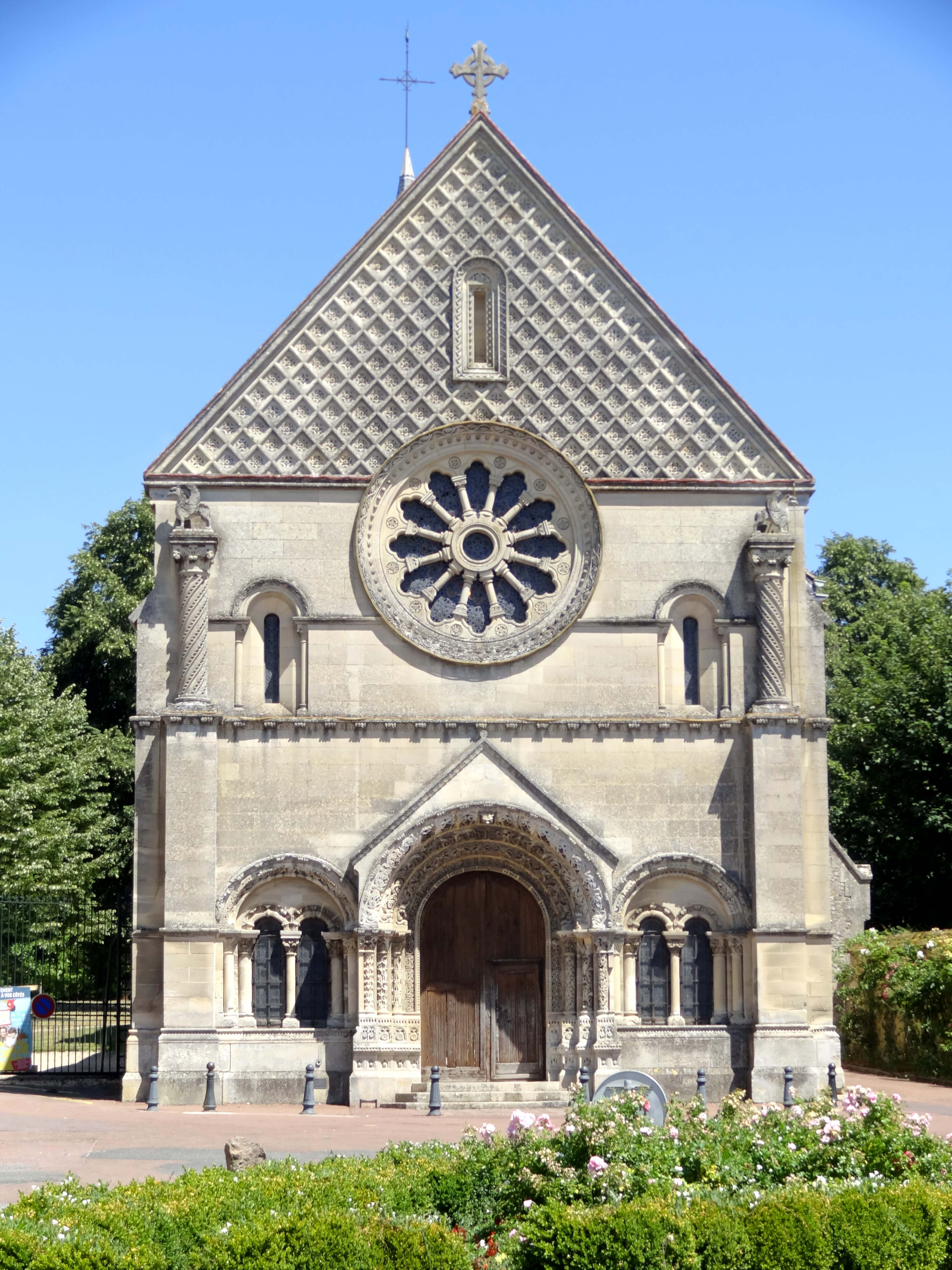 Église Sainte-Madeleine de Trie-Château - voir titre.